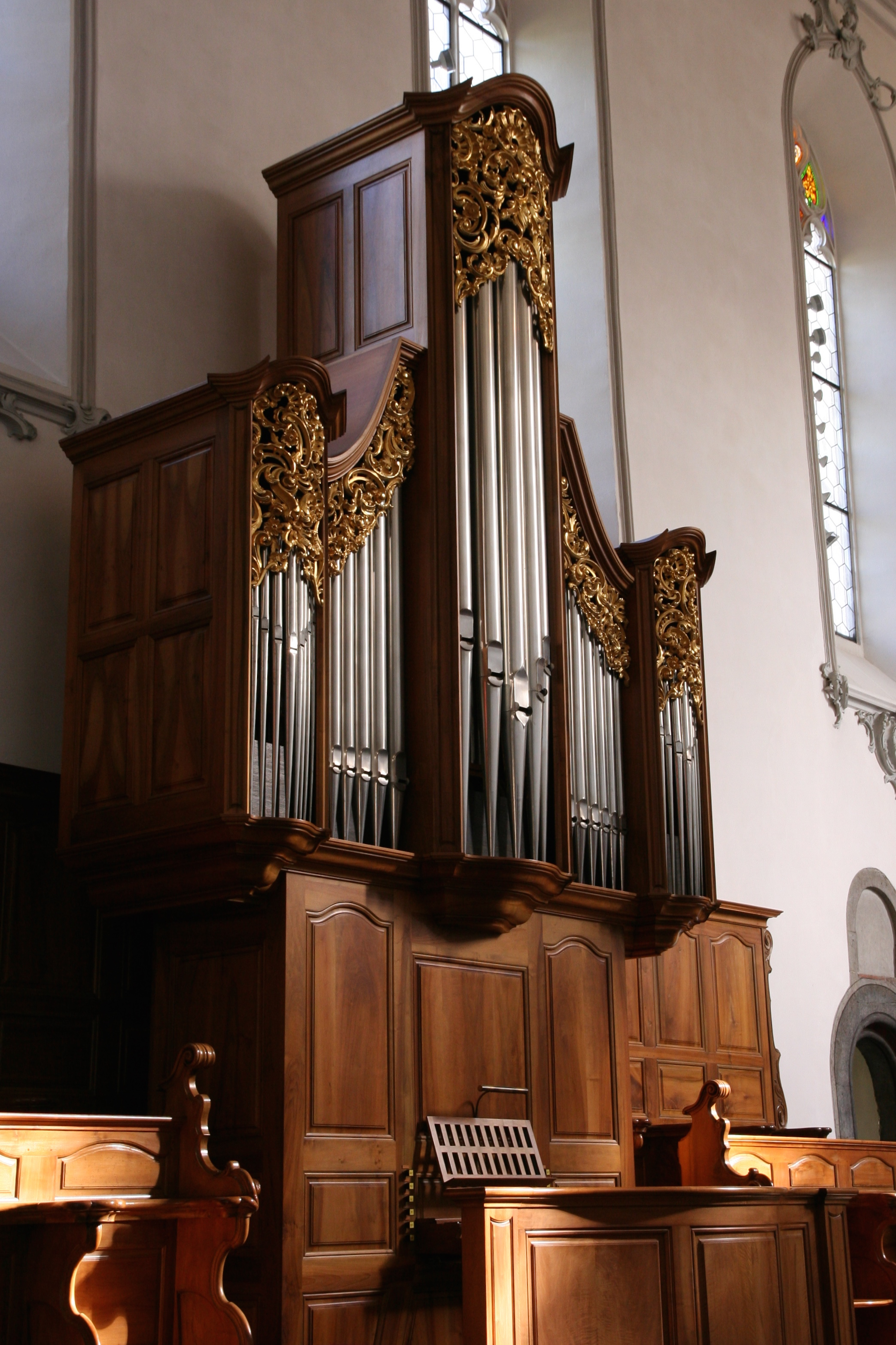 röm.-kath. Pfarrkirche St. Pelagius in Bischofszell